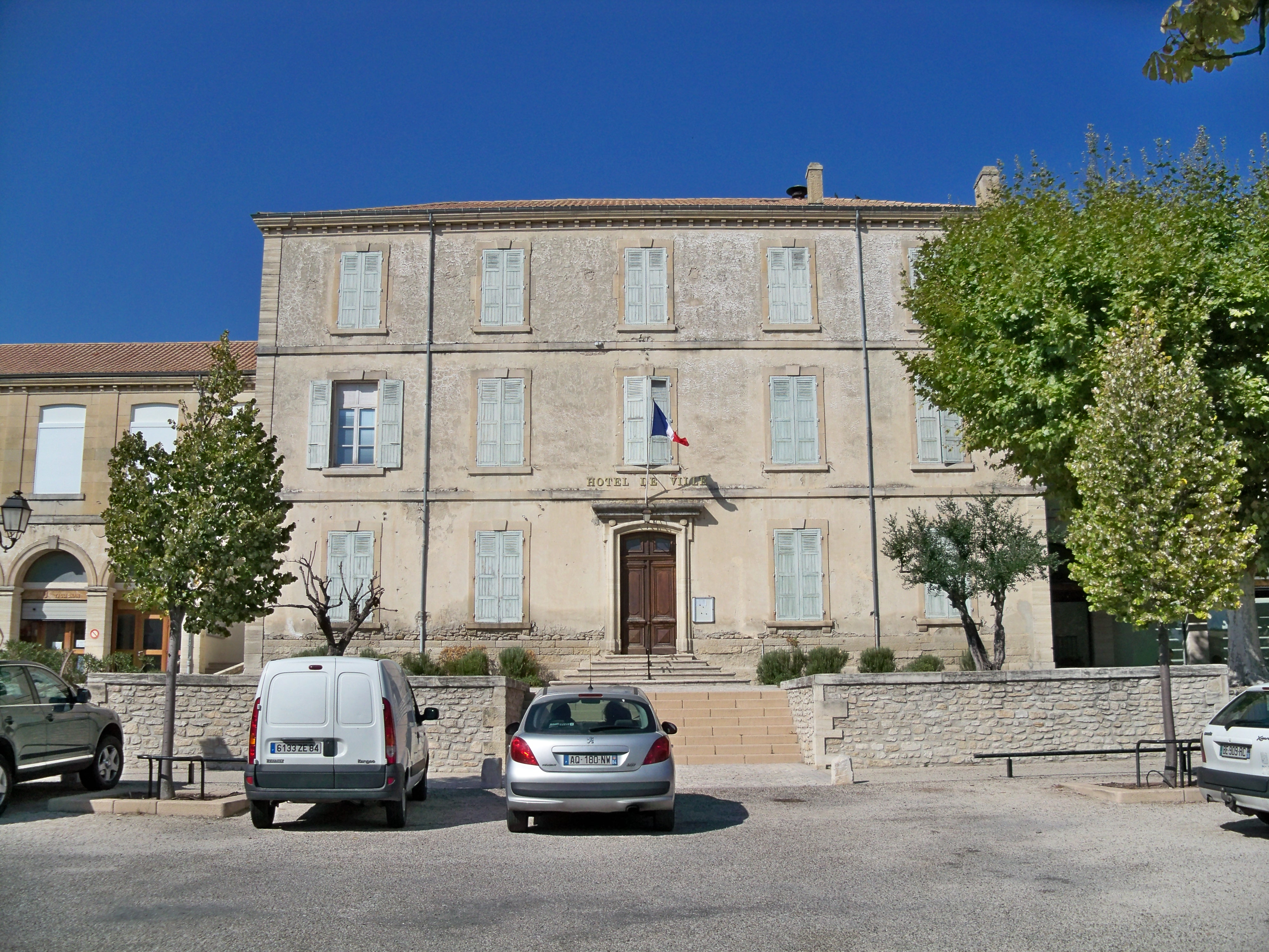 Hôtel de ville à Taulignan (26)